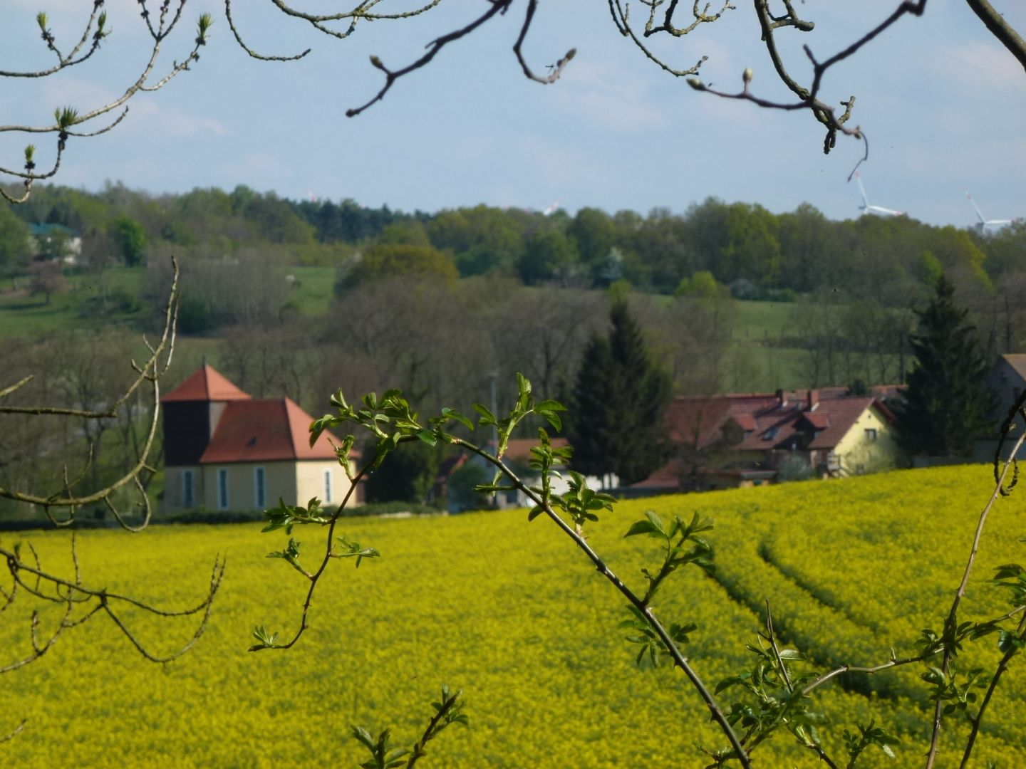 Blick vom Viadukt auf Utenbach